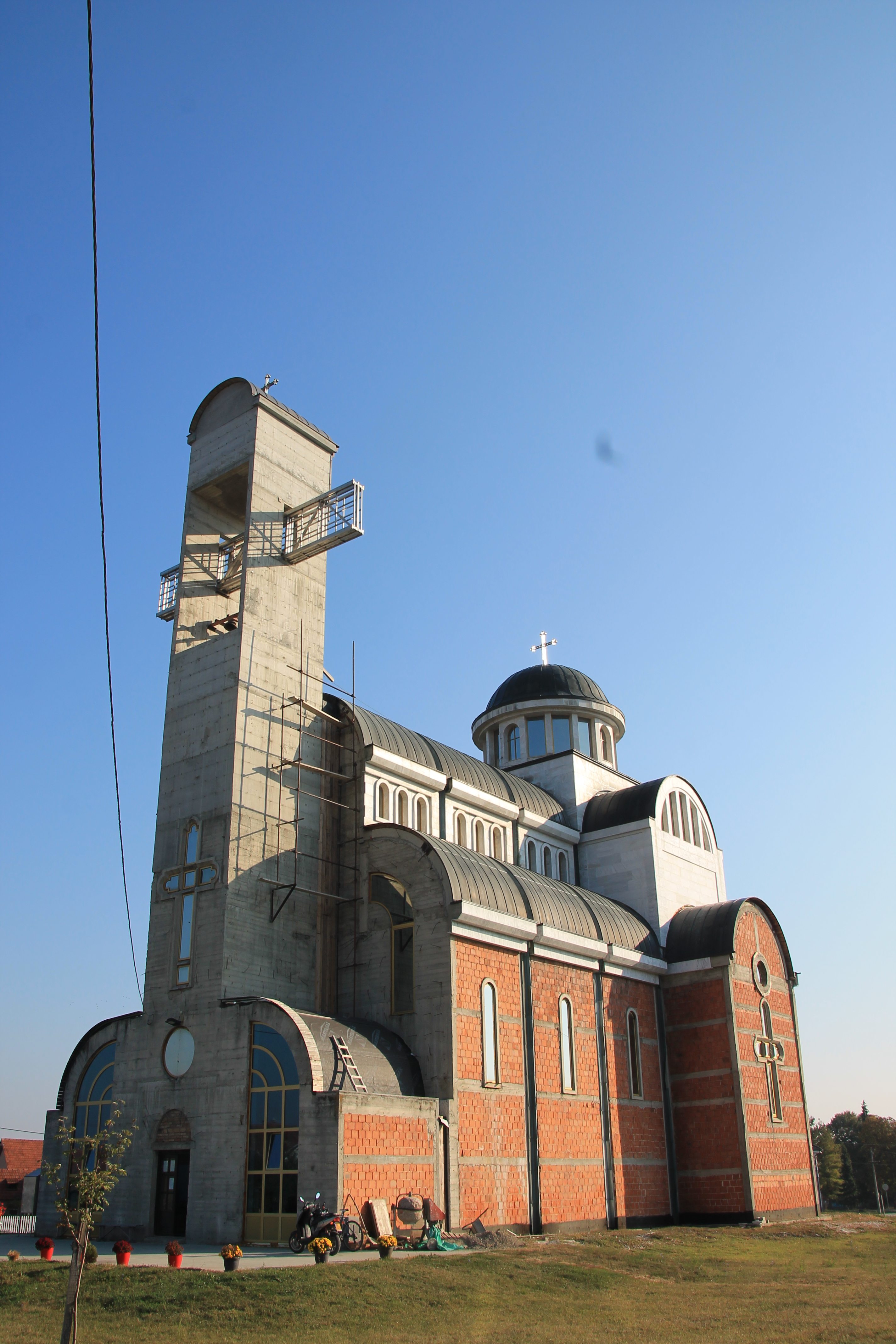 Crkva Uspenja Bogorodice Čačak